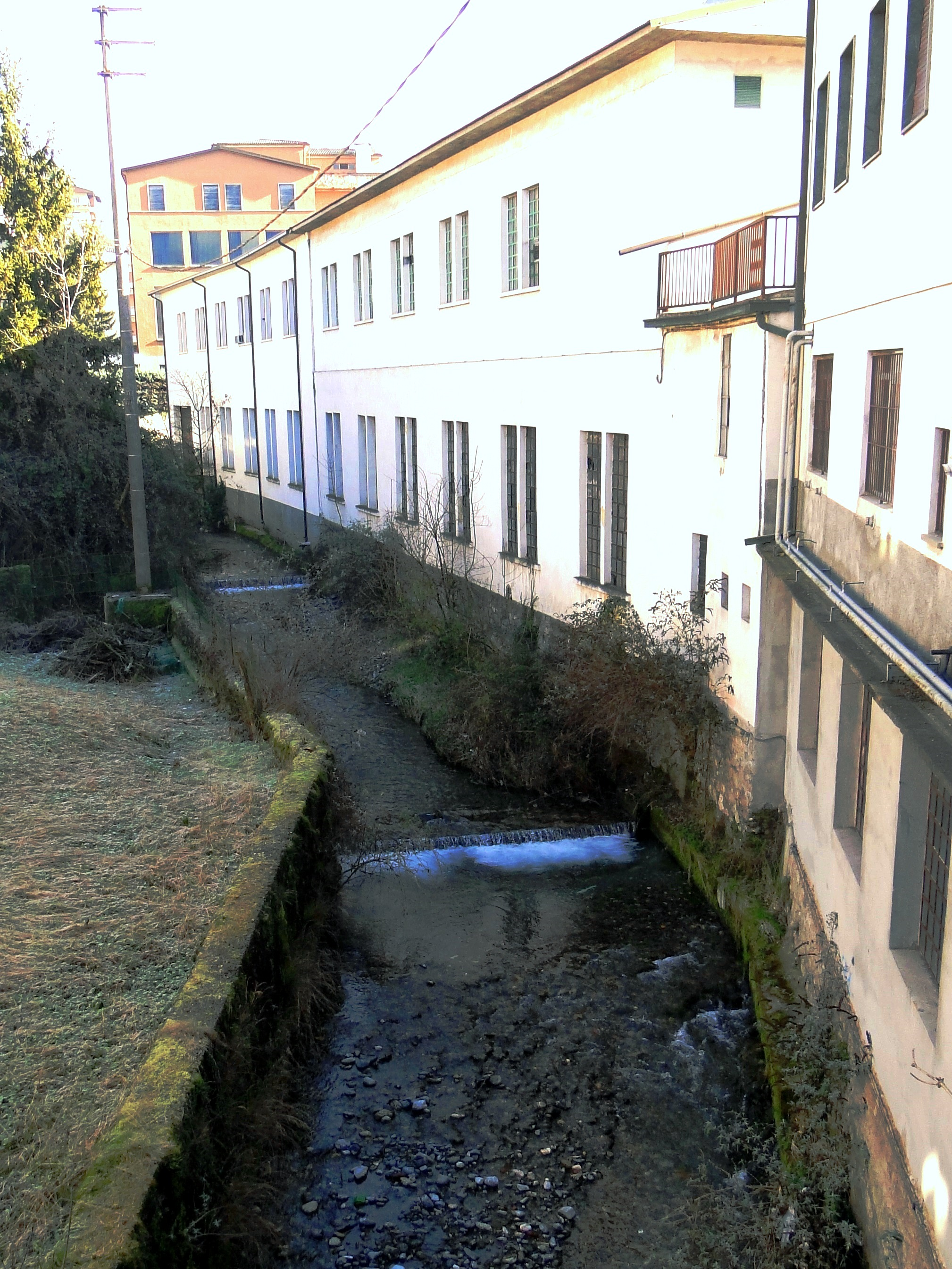 Torrente Romna. Leffe (BG). Italy